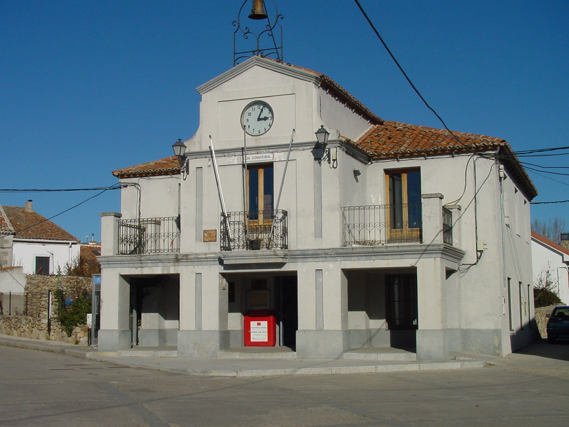 Ayuntamiento de Alameda del Valle.